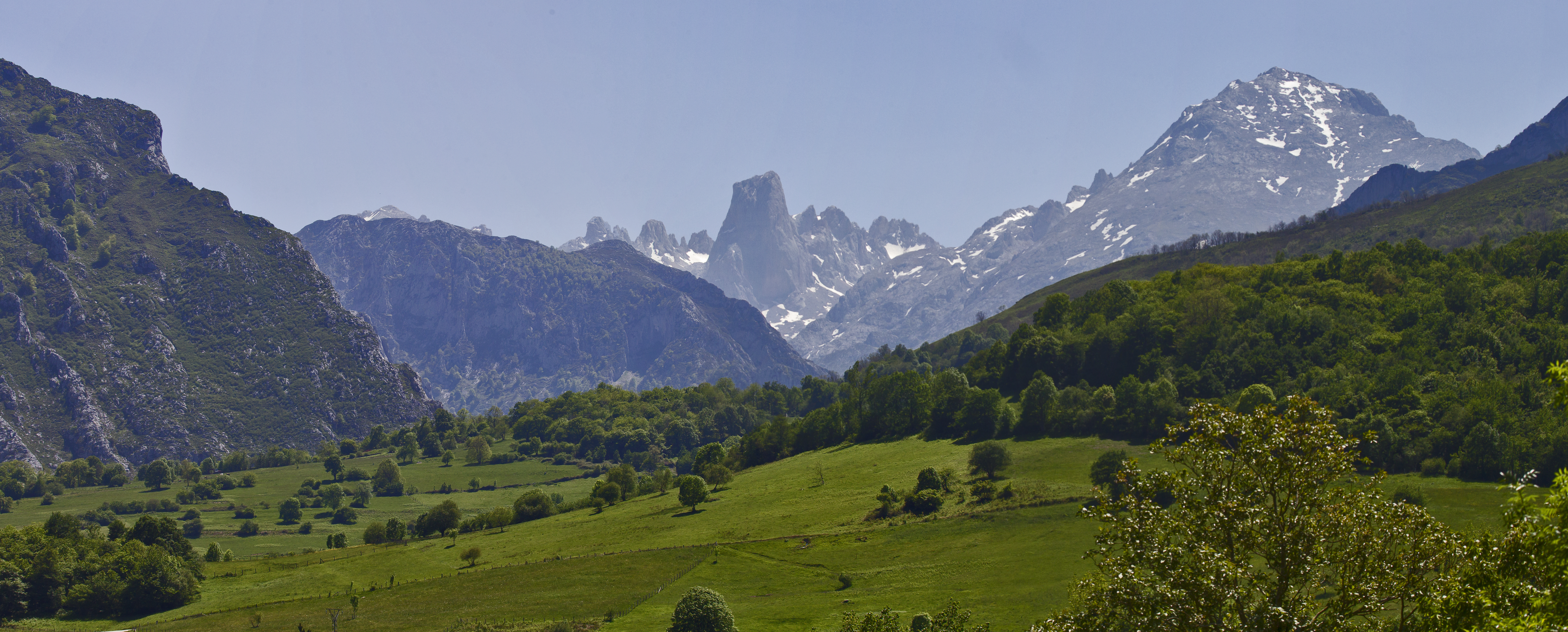 El Urriellu desde el Pozo de la Oración